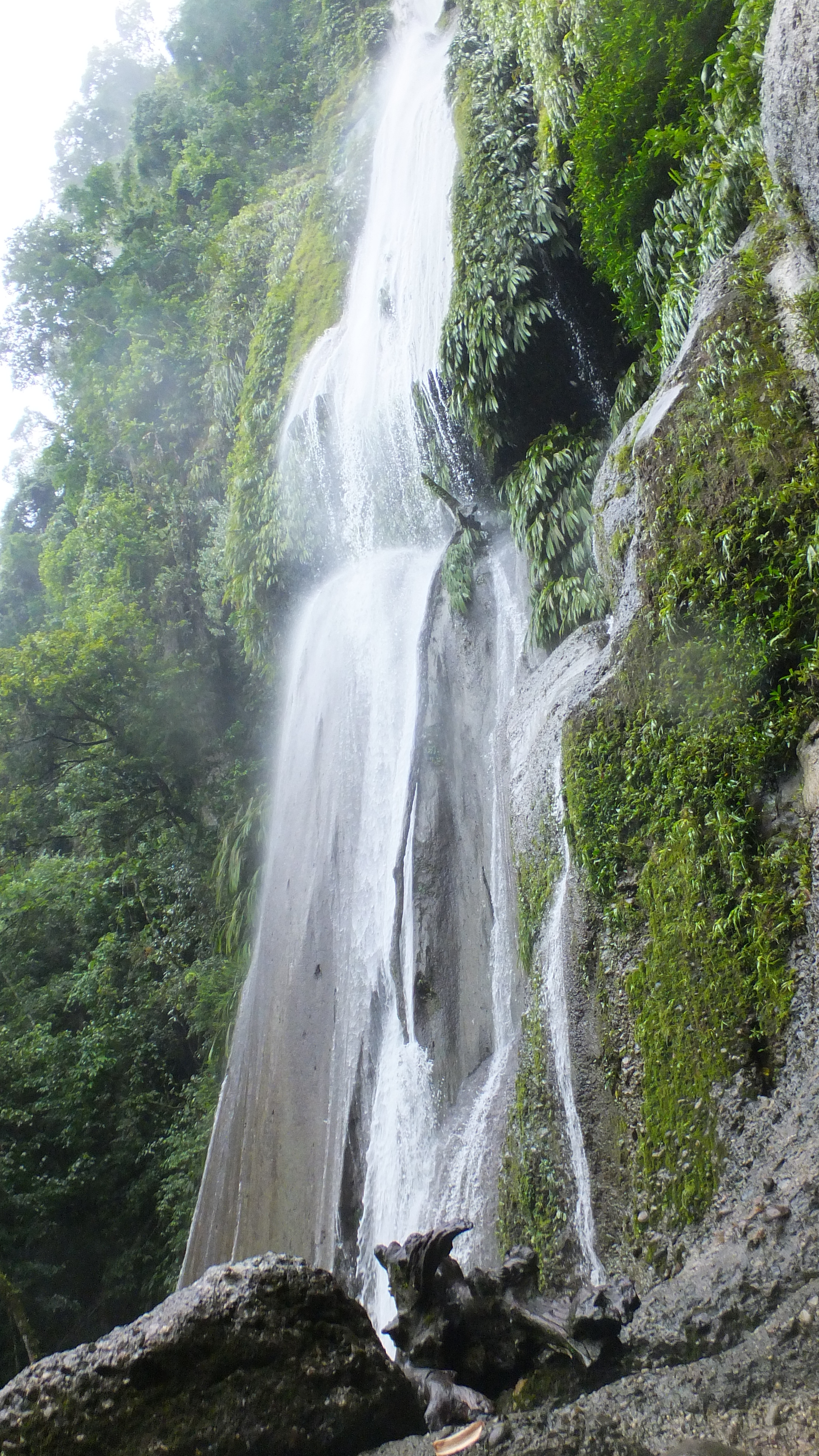 caida de agua en Pachiza-Perú